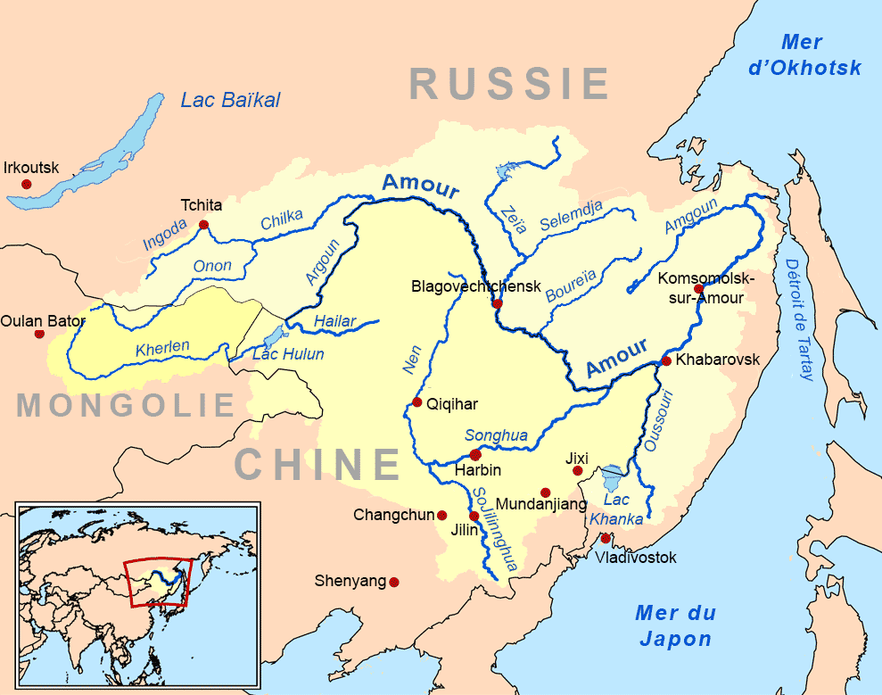 Bassin versant de l'Amour : affluents et principales villes